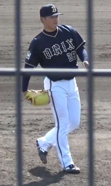 富山凌雅投手 対阪神二軍戦（2019/4/11、鳴尾浜球場）